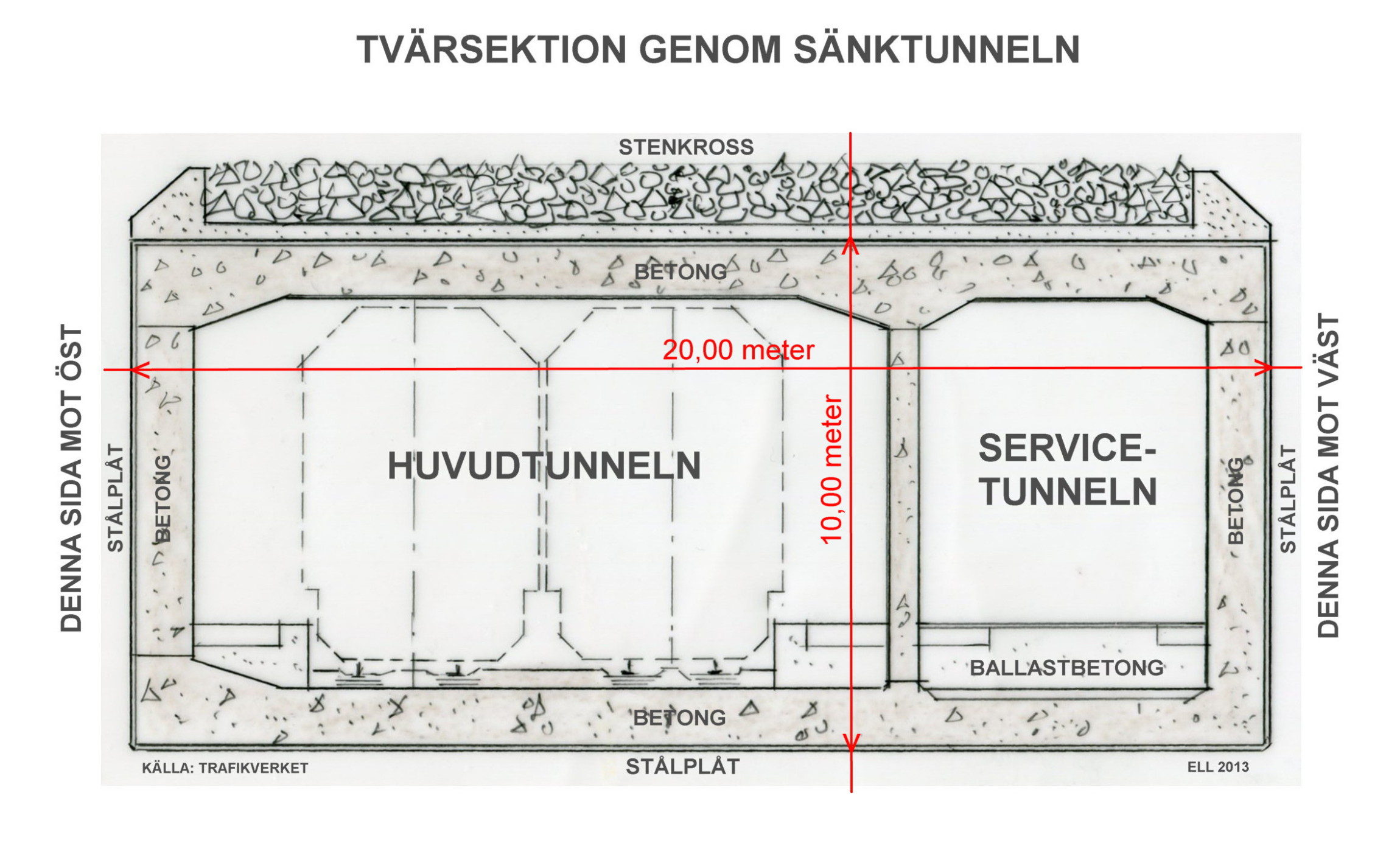 Citybanan: Sänktunnel sektion skiss